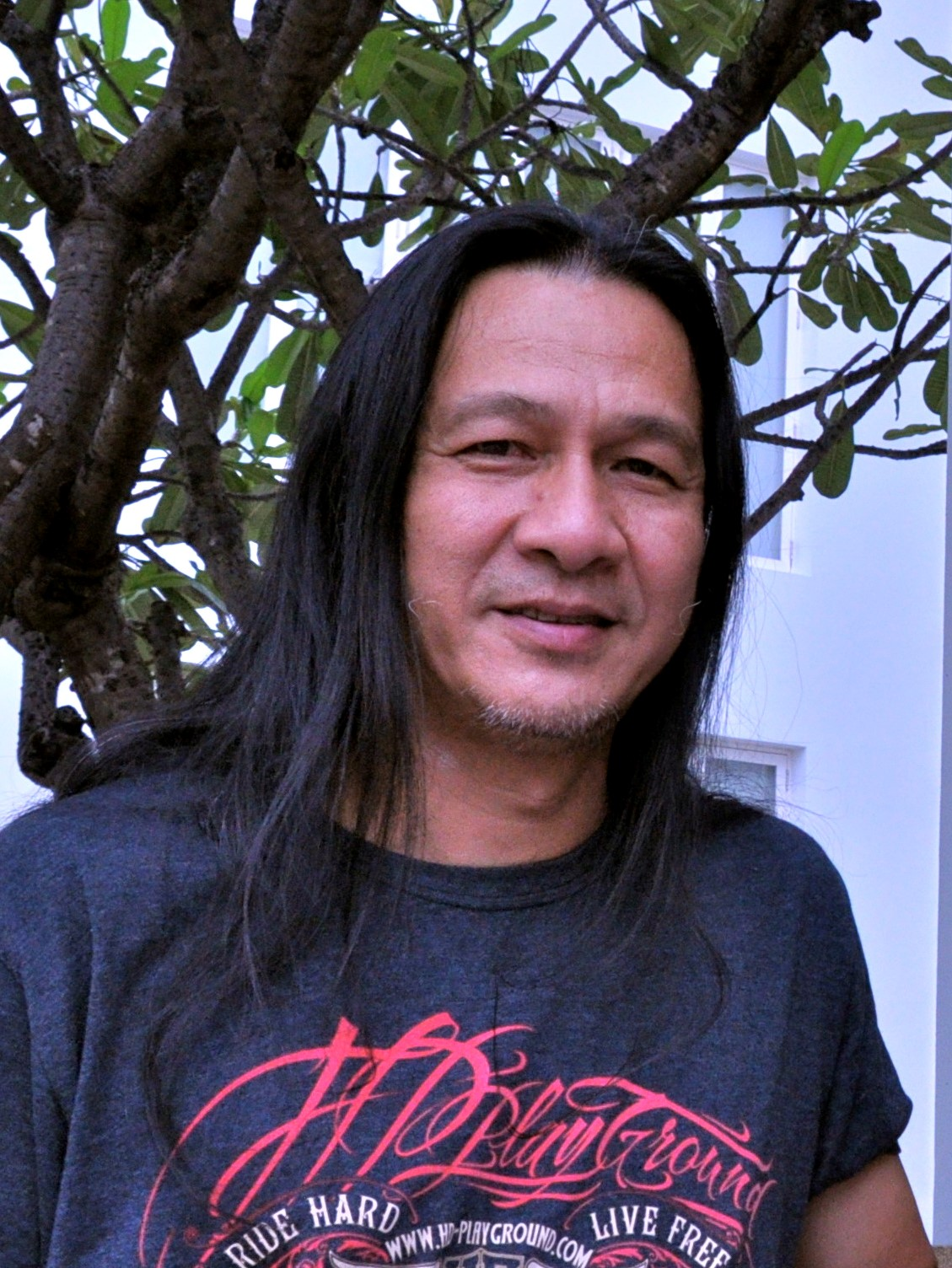 Pongpat at Polyplus